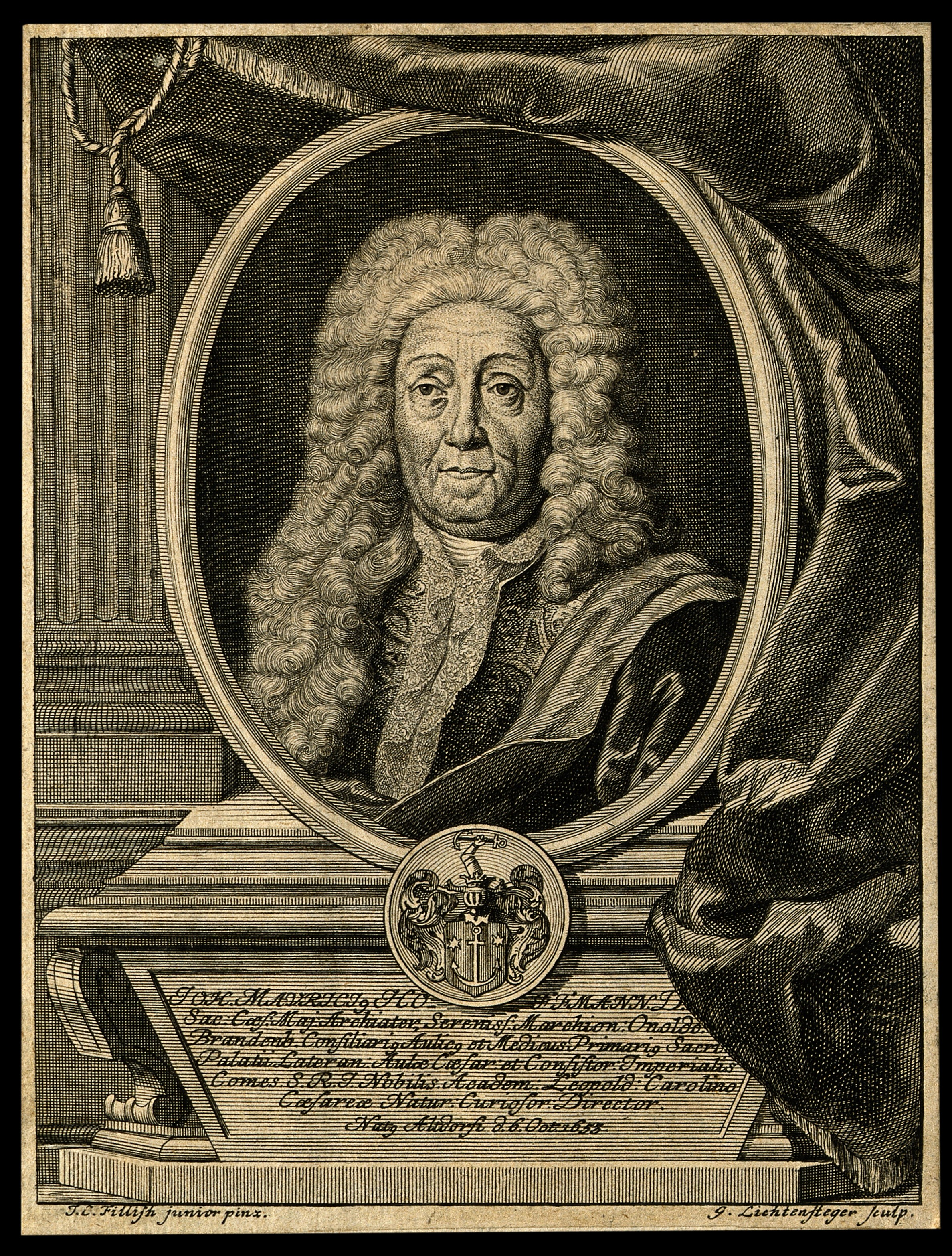 Johann Moritz Hoffmann. Line engraving by G. Lichtensteger after J. C. Fillisch, junior. Iconographic Collections Keywords: portrait prints; Johann Moritz Hoffmann; engravings; J. C. Fillisch; G. Lichtensteger